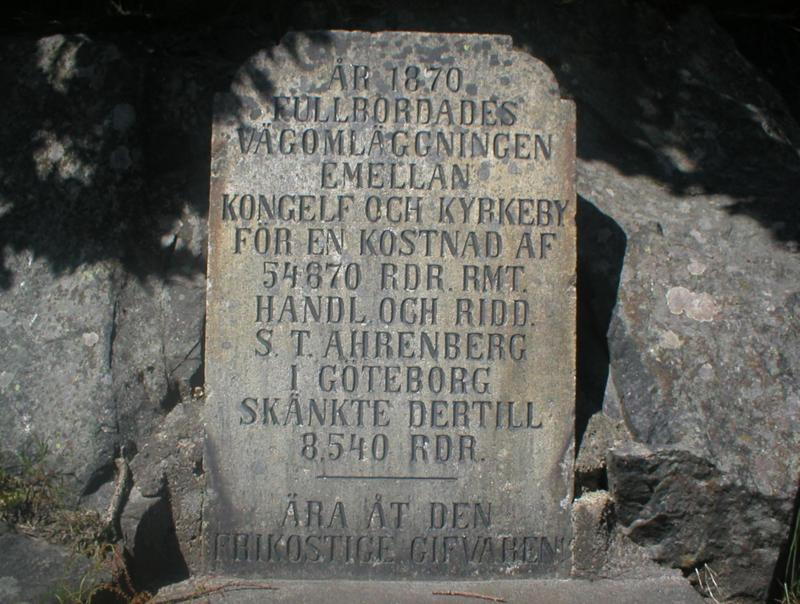 Foto av minnesmärke vid Ingetorps sjö, taget av Per Johansson 2005. Texten lyder: "År 1870 fullbordades vägomläggningen emellan Kongelf och Kyrkeby för en kostnad af 54.670 rdr. rmt. Handl och ridd. S. T. Ahrenberg i Göteborg skänkte dertill 8.540 rdr. Ära åt den frikostige gifvaren."